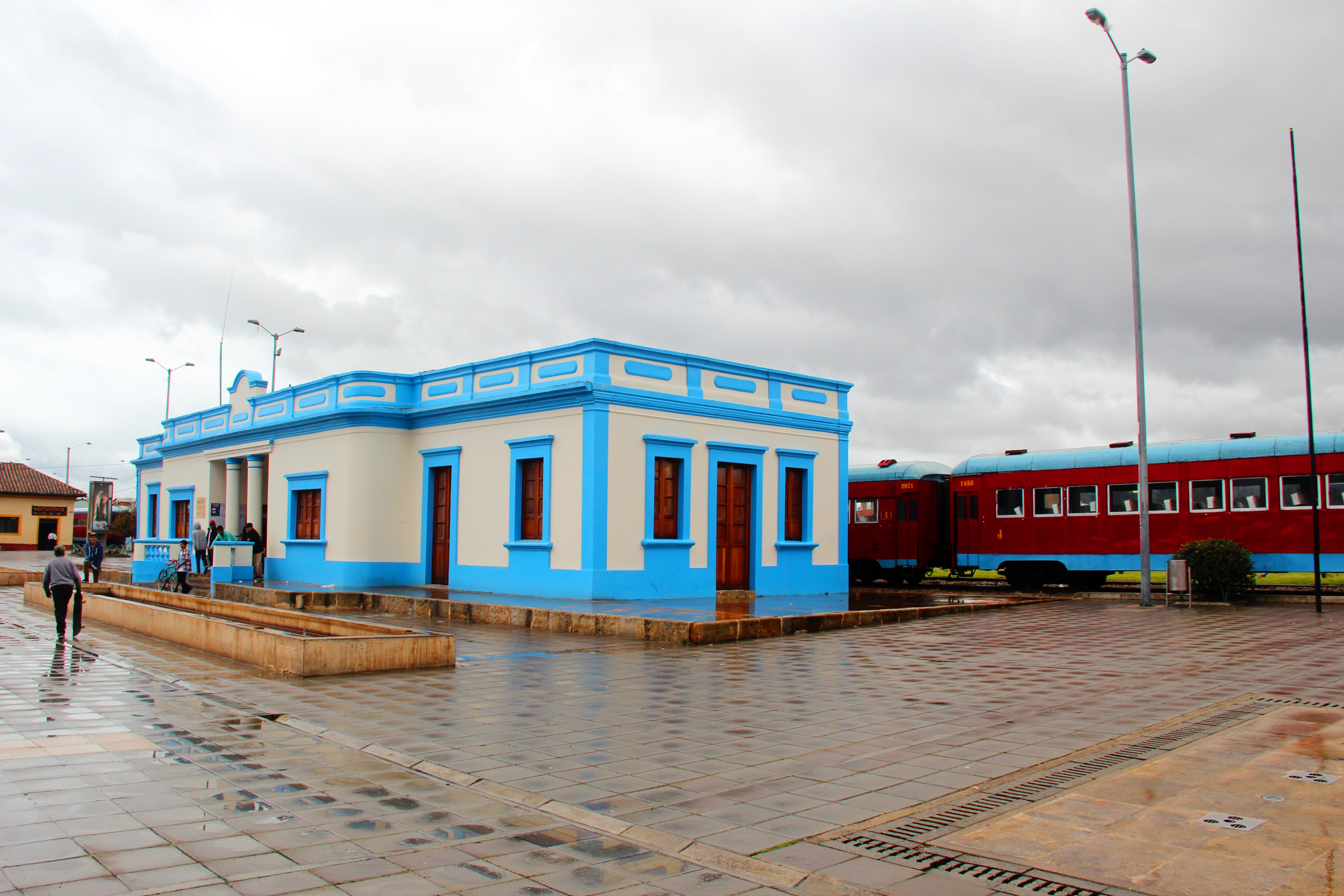 Estación del Ferrocarril de Cajica, en Cundinamarca, Colombia. La estación pertenece al Ferrocarril del Norte Línea La Caro - Barbosa. Kilómetro 126, declarado bien de interés cultural a través del Decreto 746 del 24 de abril de 1996